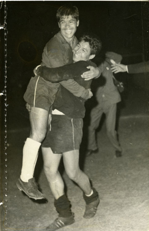 Humberto Carlos Nelson Cruz Silva, (Santiago de Chile, 8 de diciembre de 1939) - popularmente conocido por su apodo de Chita - es un ex futbolista chileno que se desempeñaba en la posición de Defensa. Recordado por su identificación con el club Colo-Colo y por haber integrado la selección de fútbol de Chile durante nueve años.